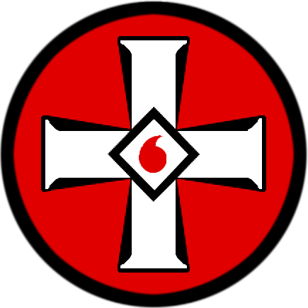 Ku Klux Klan symbol